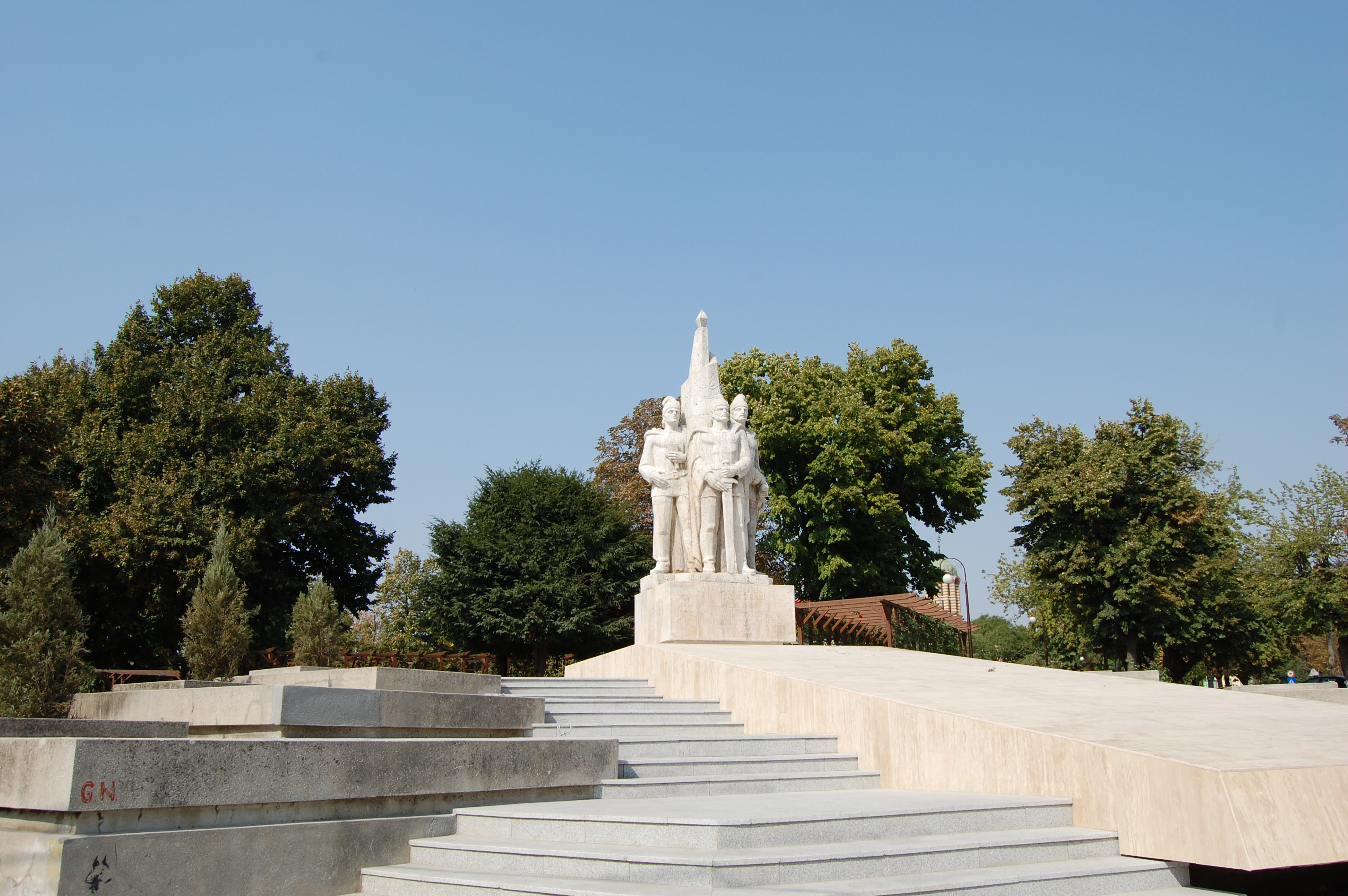 Buzesti Brothers monument, Craiova, Romania